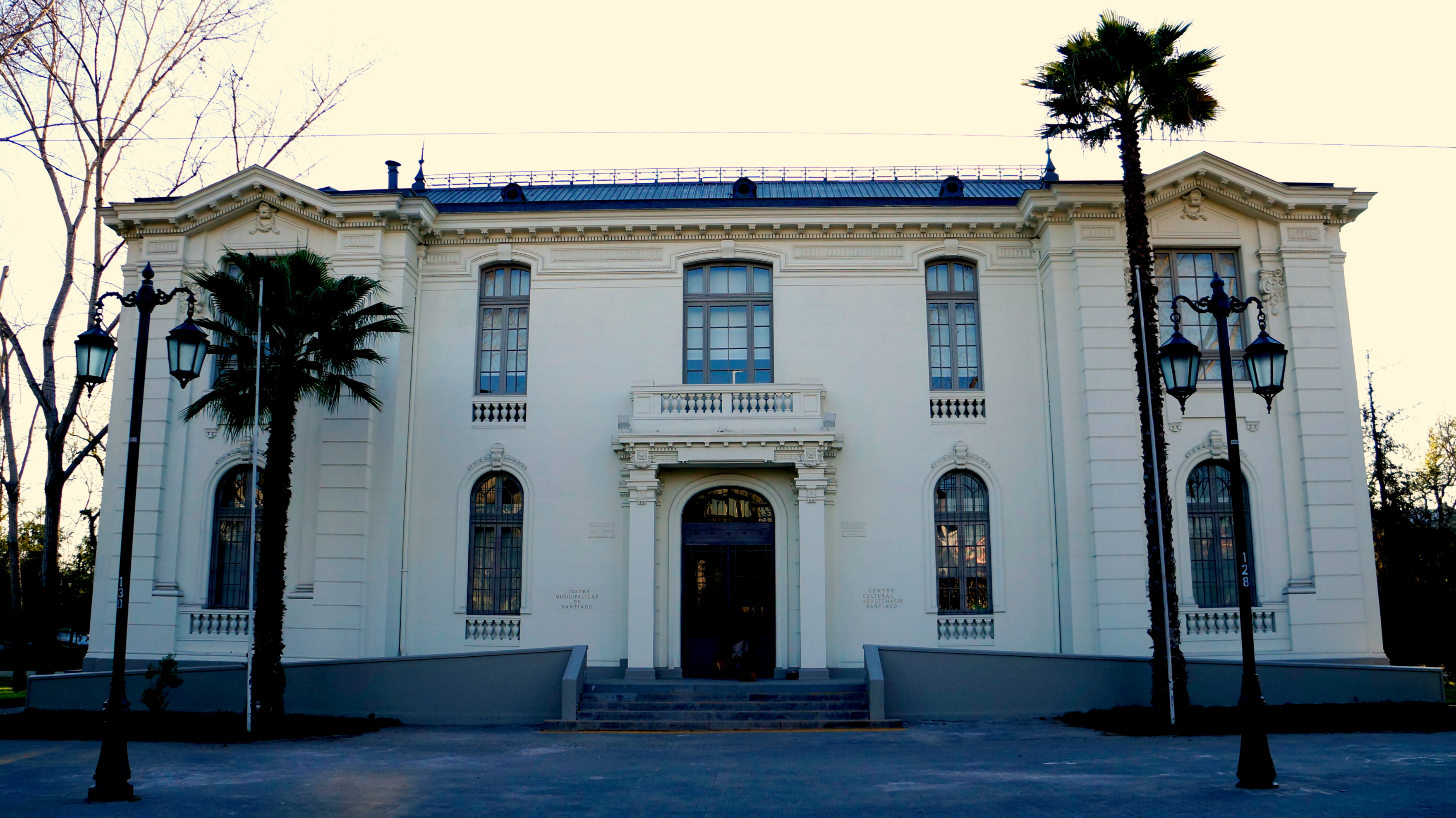 Parque Quinta Normal. Pabellón de Enología, Av. Matucana 272, Quinta Normal. This is a photo of a national monument in Chile: 136